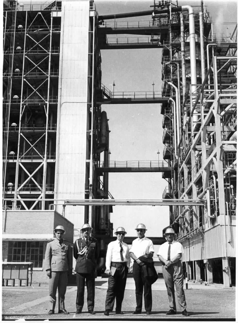 ביקור ראש אמ"ן, האלוף מאיר עמית, במתקני הנפט באבדאן שבאירן. בתמונה: מימין לשמאל: אל"מ יעקב נמרודי - לשעבר נספח צה"ל בטהרן, מאיר עמית, רפי אפרת ושני קצינים אירניים.